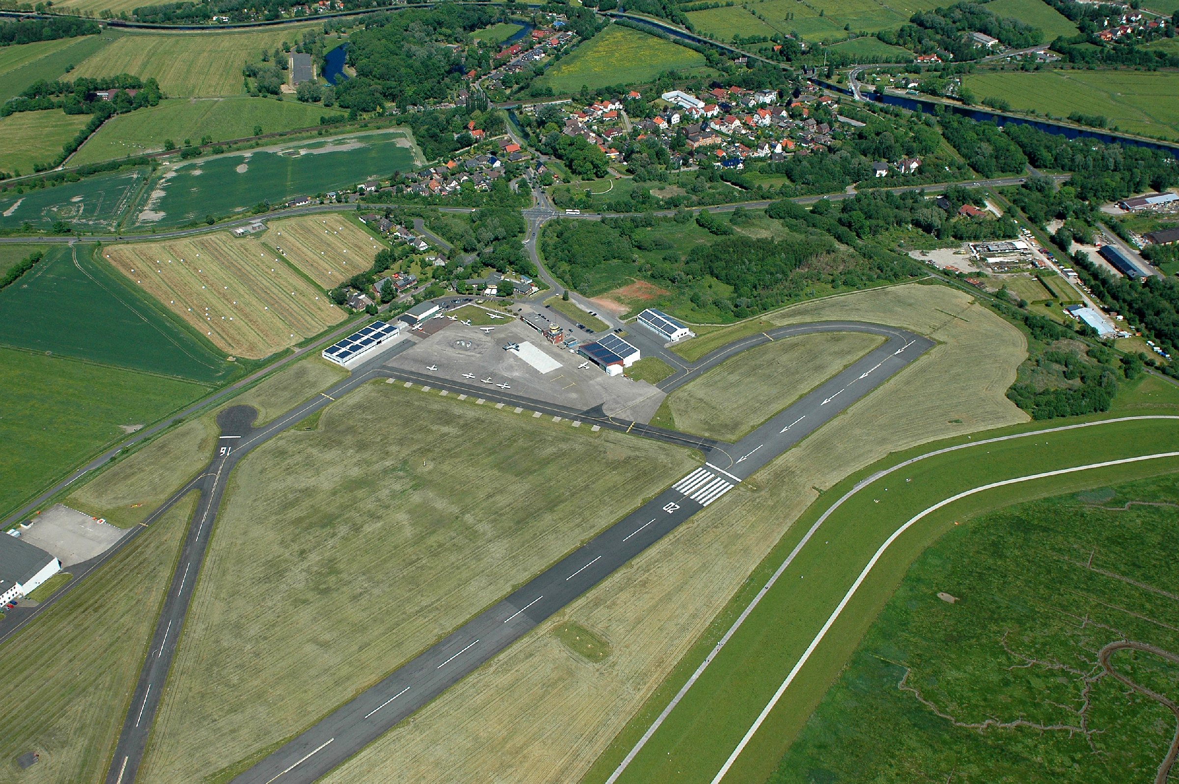 Fotoflug vom Flugplatz Nordholz-Spieka über Cuxhaven und Wilhelmshaven